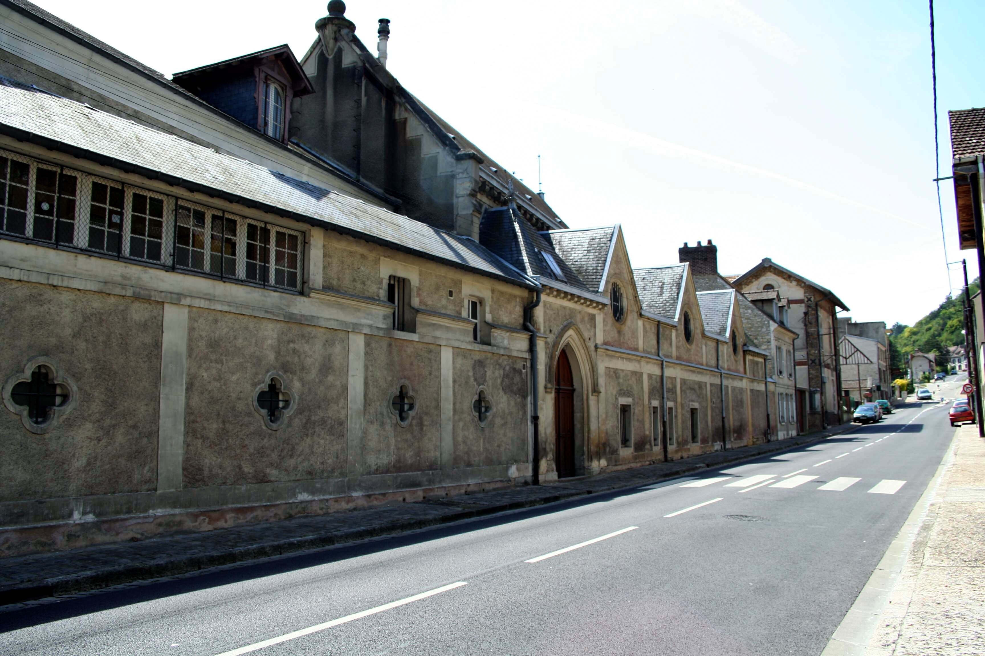 Hôpital, la Roche-Guyon, Val-d'Oise (France)